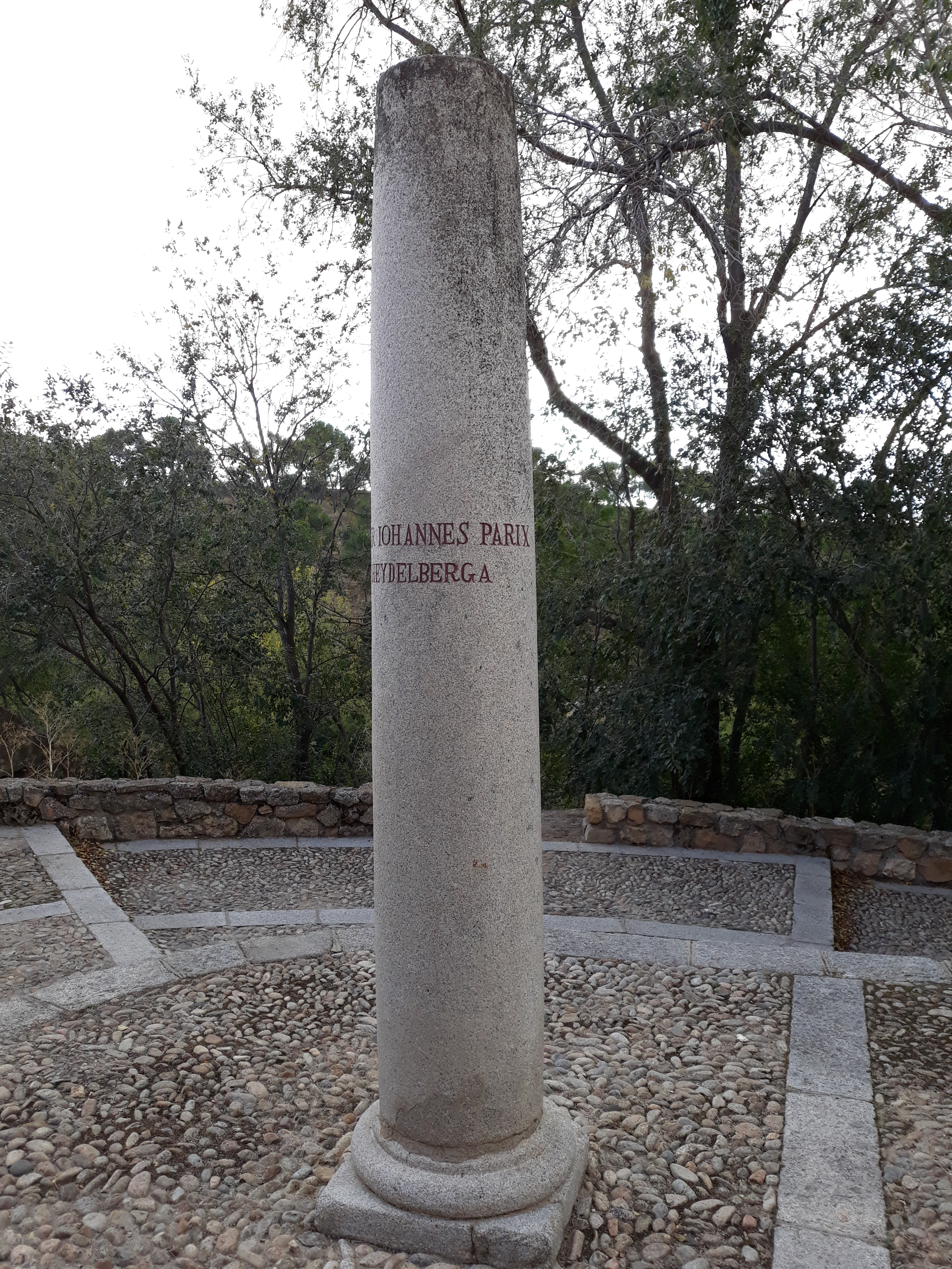 Das Denkmal für den deutsch-spanischen Drucker Johannes (Juan) Parix in Segovia.